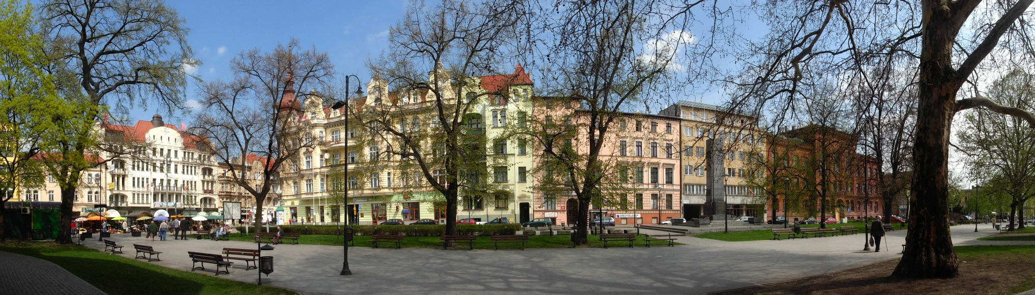 Plac Wolności w Bydgoszczy